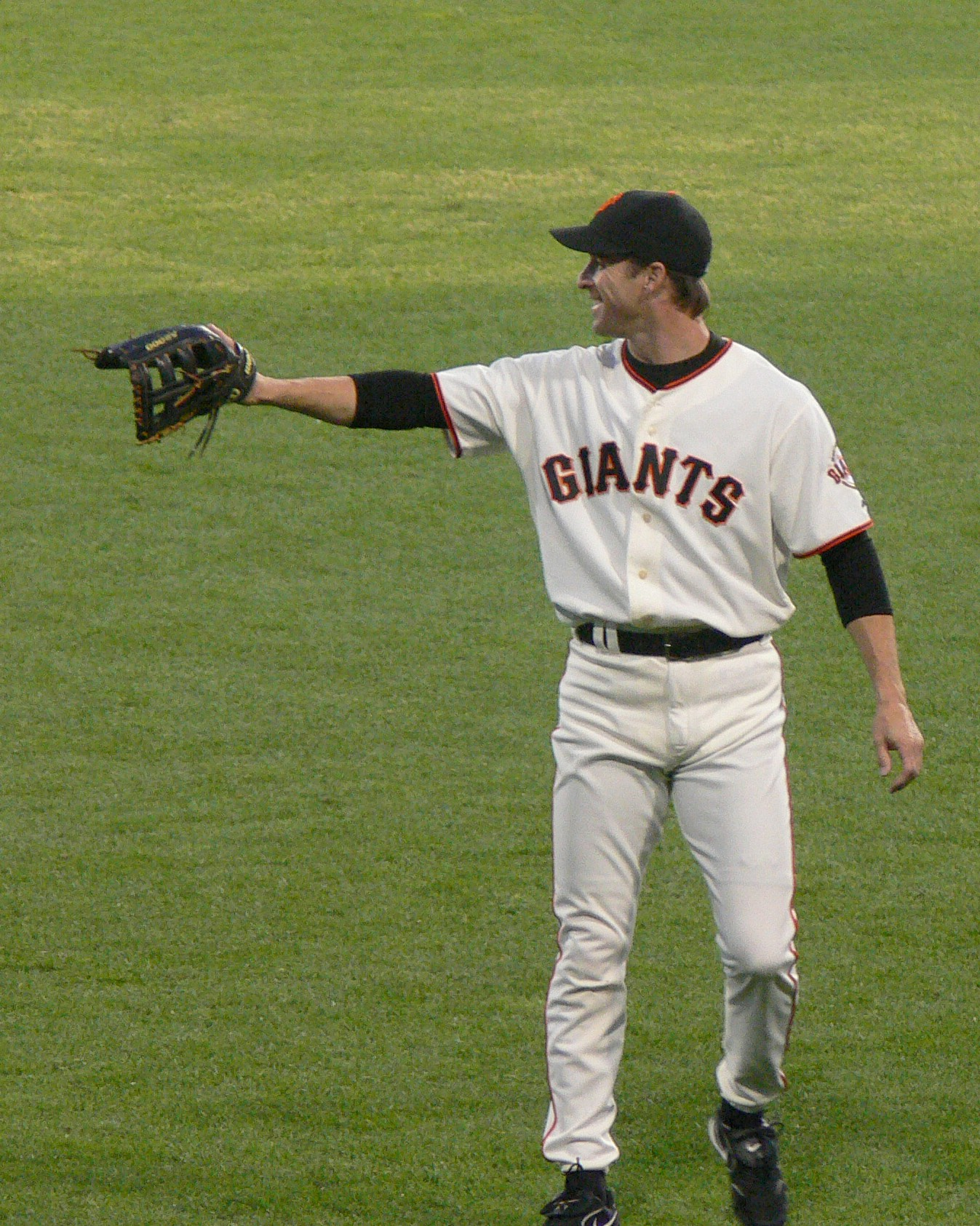 Steve FinleySteve Finley